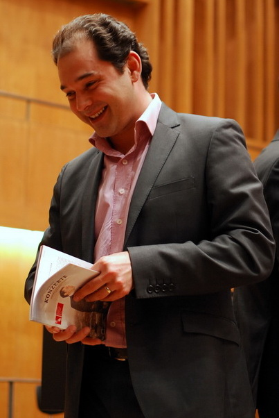 Tugan Sokhiev bei der Vorstellung des Programms des DSO 2012/2013 am 24.04.2012 in Berlin